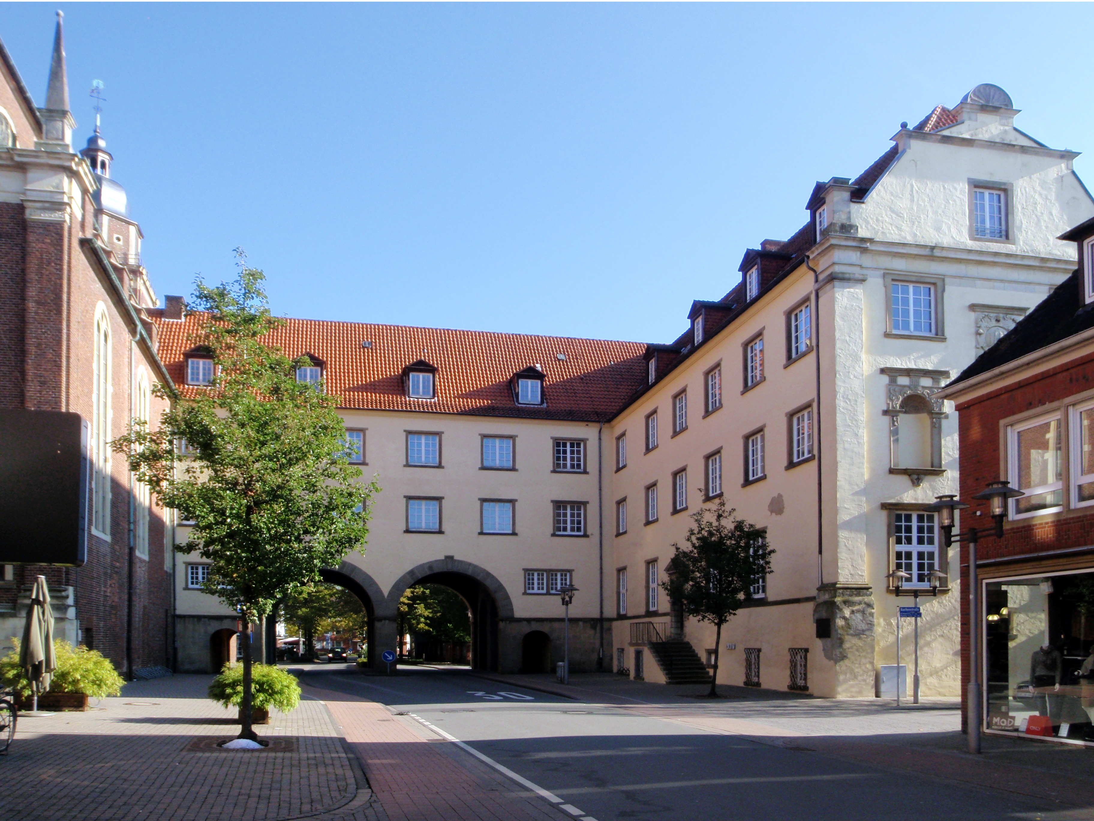 Die Liebfrauenburg, auch als Stadtschloss bezeichnet, in Coesfeld.